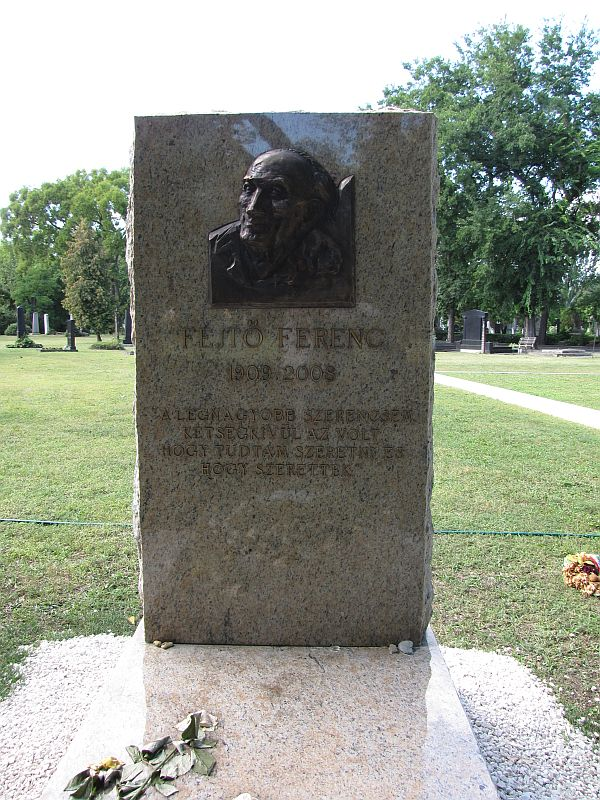 Fejtő Ferenc (franciául: François Fejtő, eredeti nevén: Fischel Ferenc[1]) (Nagykanizsa, 1909. augusztus 31. – Párizs, 2008. június 2.) francia-magyar történész, kritikus, Széchenyi-díjas író, baloldali publicista sírja Budapesten. Kerepesi temető: 35-2-63